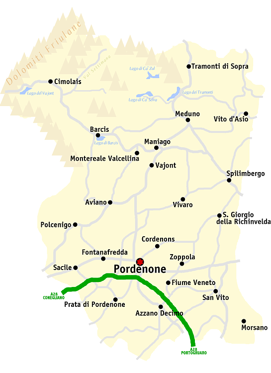 Kaart van de provincie Pordenone.